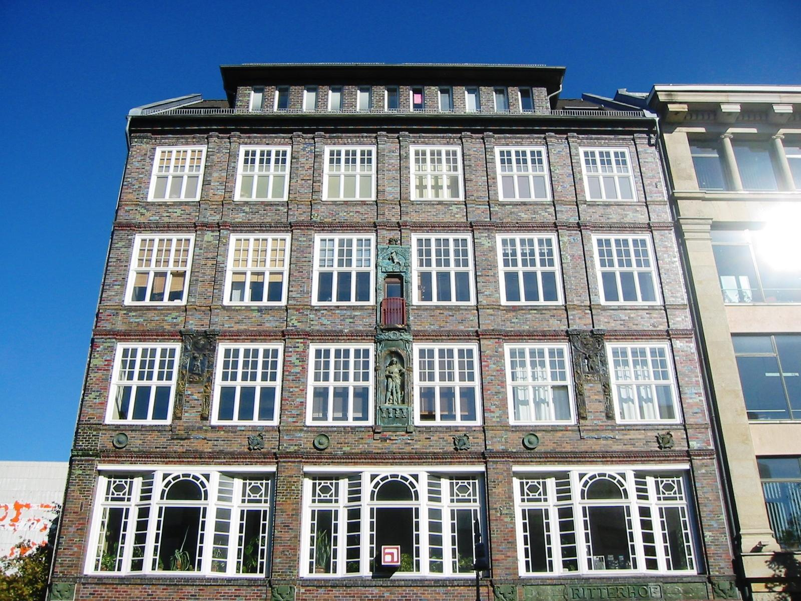 Ritterhof in der Ritterstraße 11 in Berlin-Kreuzberg. Das Gebäude gehört zu den wenigen noch erhaltenen historischen Gebäuden in dieser Straße.